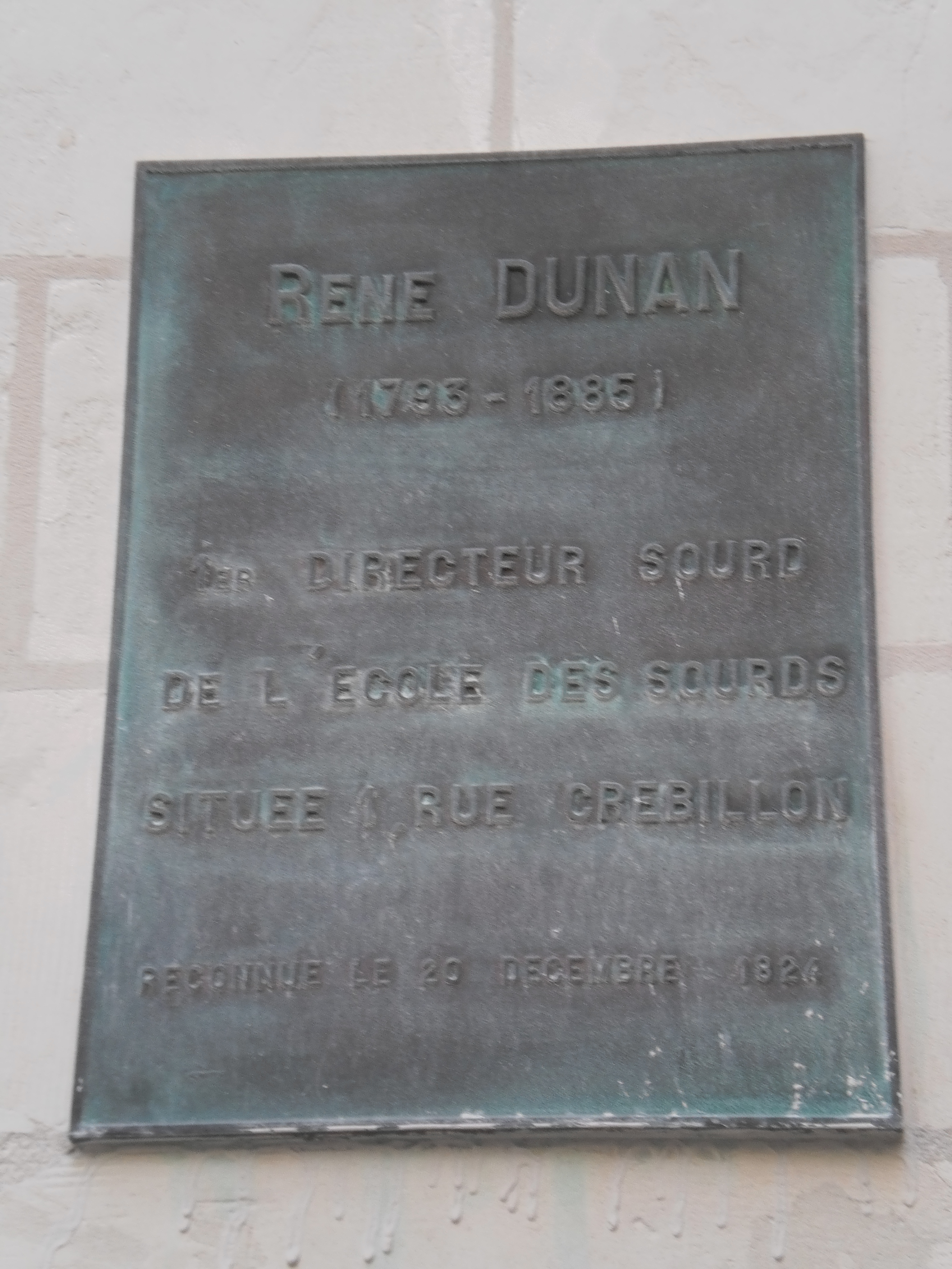 Nantes (France) - Plaque commémorative à la mémoire d'Henri Dunan, angle de la rue Crébillon et de la rue de Guérande.